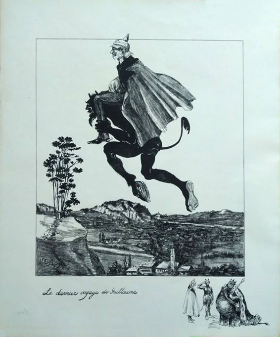 Le dernier voyage de Guillaume